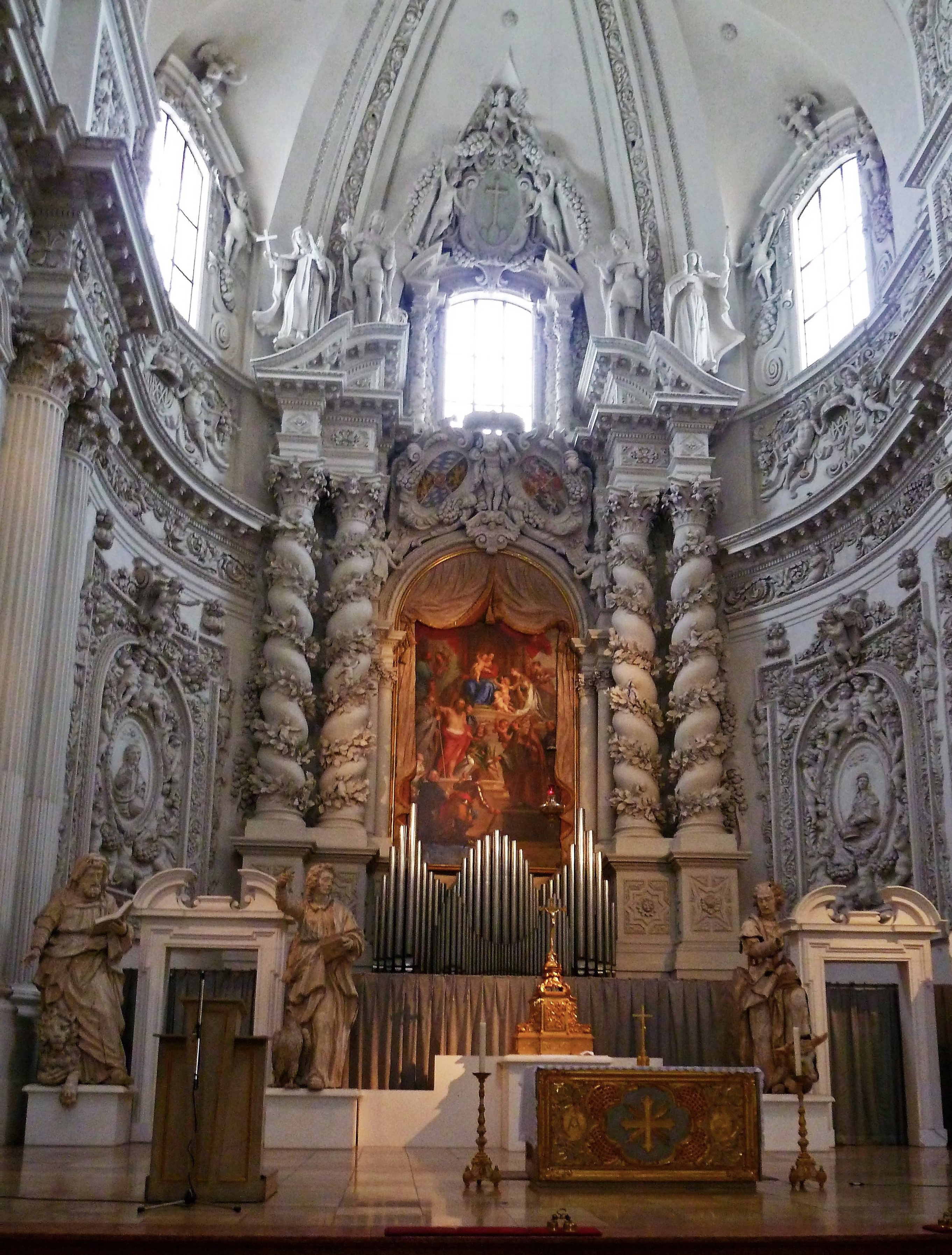 Theatinerkirche (München), Hochaltar